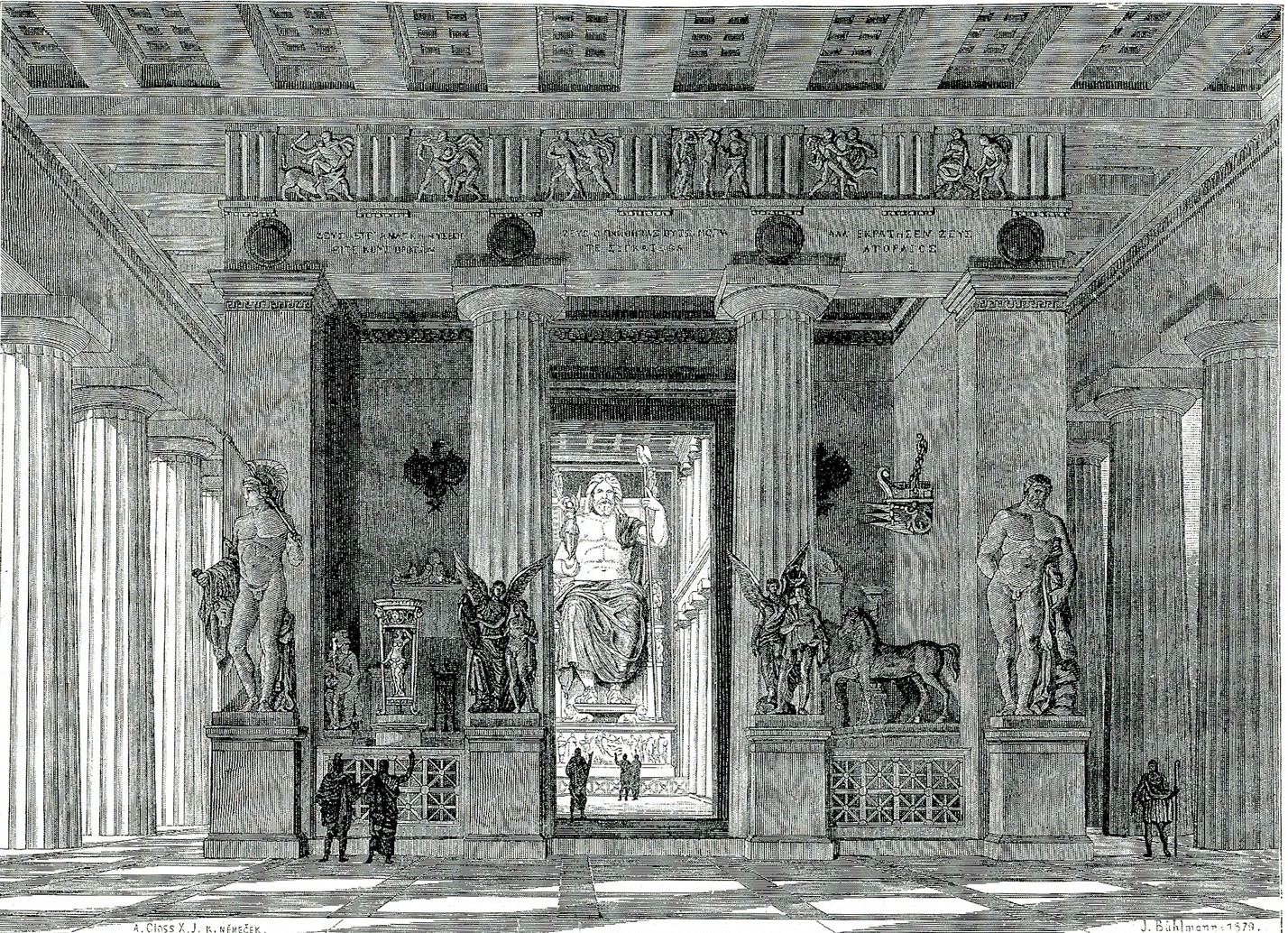 Ιάκωβος Φάλκε. Ελλάς, ο Βίος των Αρχαίων Ελλήνων. Κατά το γερμανικό του Ιακώβου Φάλκε, Ν. Γ. Πολίτης (μετ.), Αθήνα, Κάρολος Βίλμπεργκ, 1887